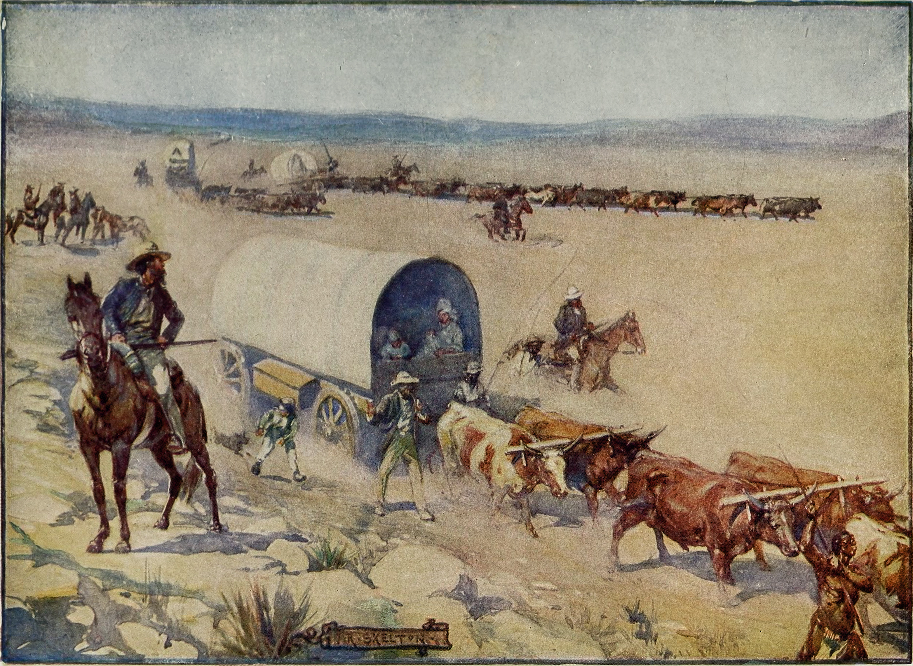 The Voortrekkers